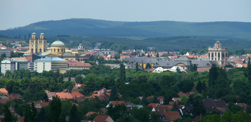 Eger látképe a Kistályai út menti dombokról. Balra az Egri Bazilika kupolája látható